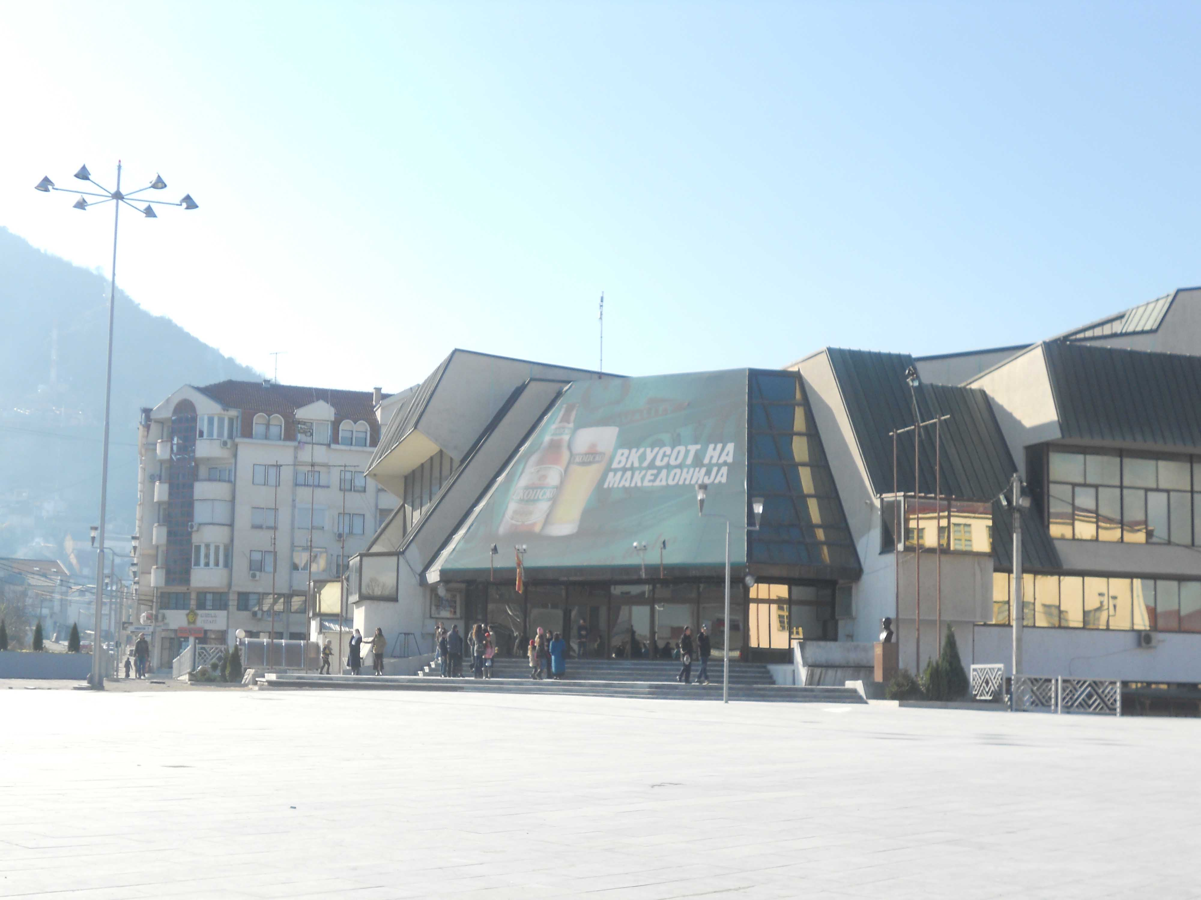 Народен театар „Антон Панов“ - Струмица